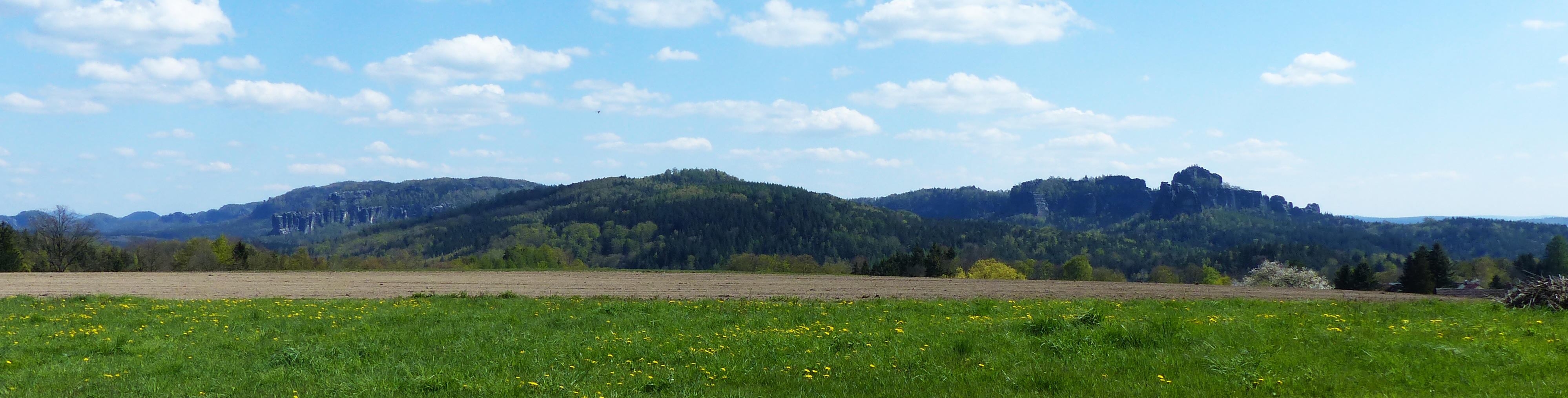 Blick auf die Hintere Sächsische Schweiz von Norden (Altendorf): Mitte: Kleine Liebe und Hohe Liebe; links: Affensteine; rechts: Schrammsteine